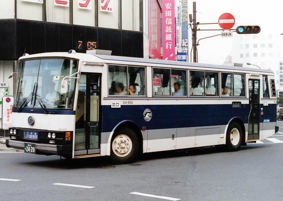 中国JRバス 三菱ふそう P-MP618M改 富士重 15型